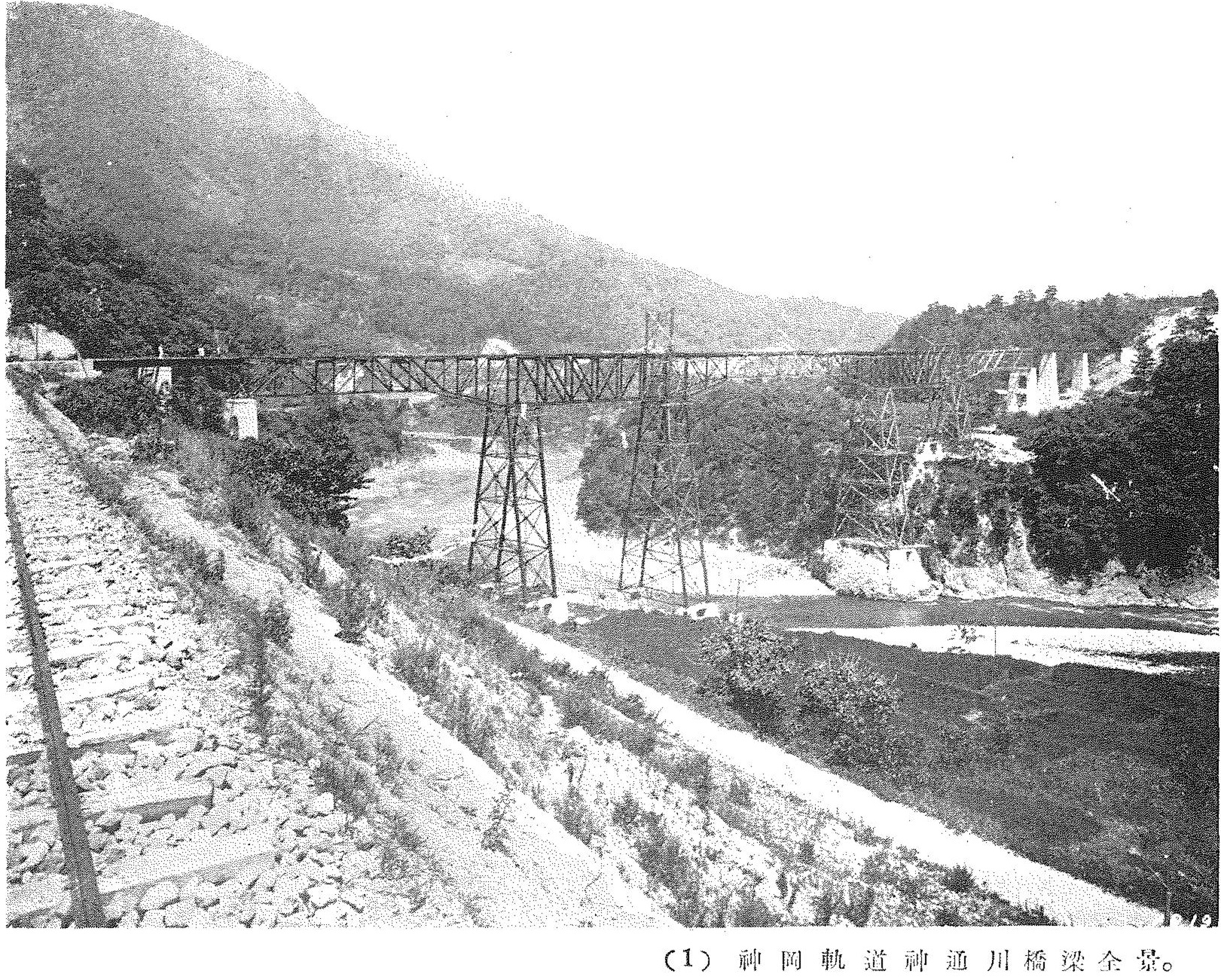 神岡軌道神通川橋梁